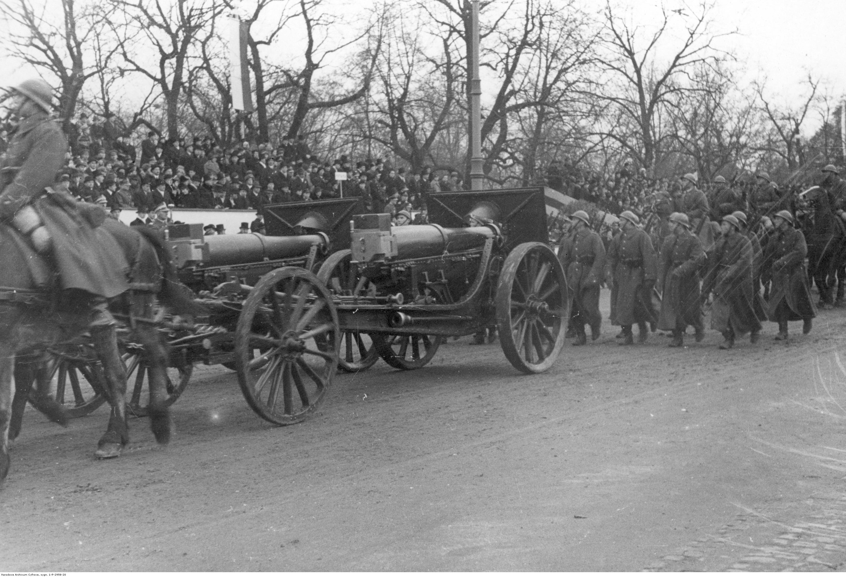 Obchody Święta Niepodległości w Warszawie w 1936 r. Defilada oddziałów artylerii - 155 mm haubice Schneider wz. 1917. Koncern Ilustrowany Kurier Codzienny - Archiwum Ilustracji. Sygnatura: 1-P-2958-20